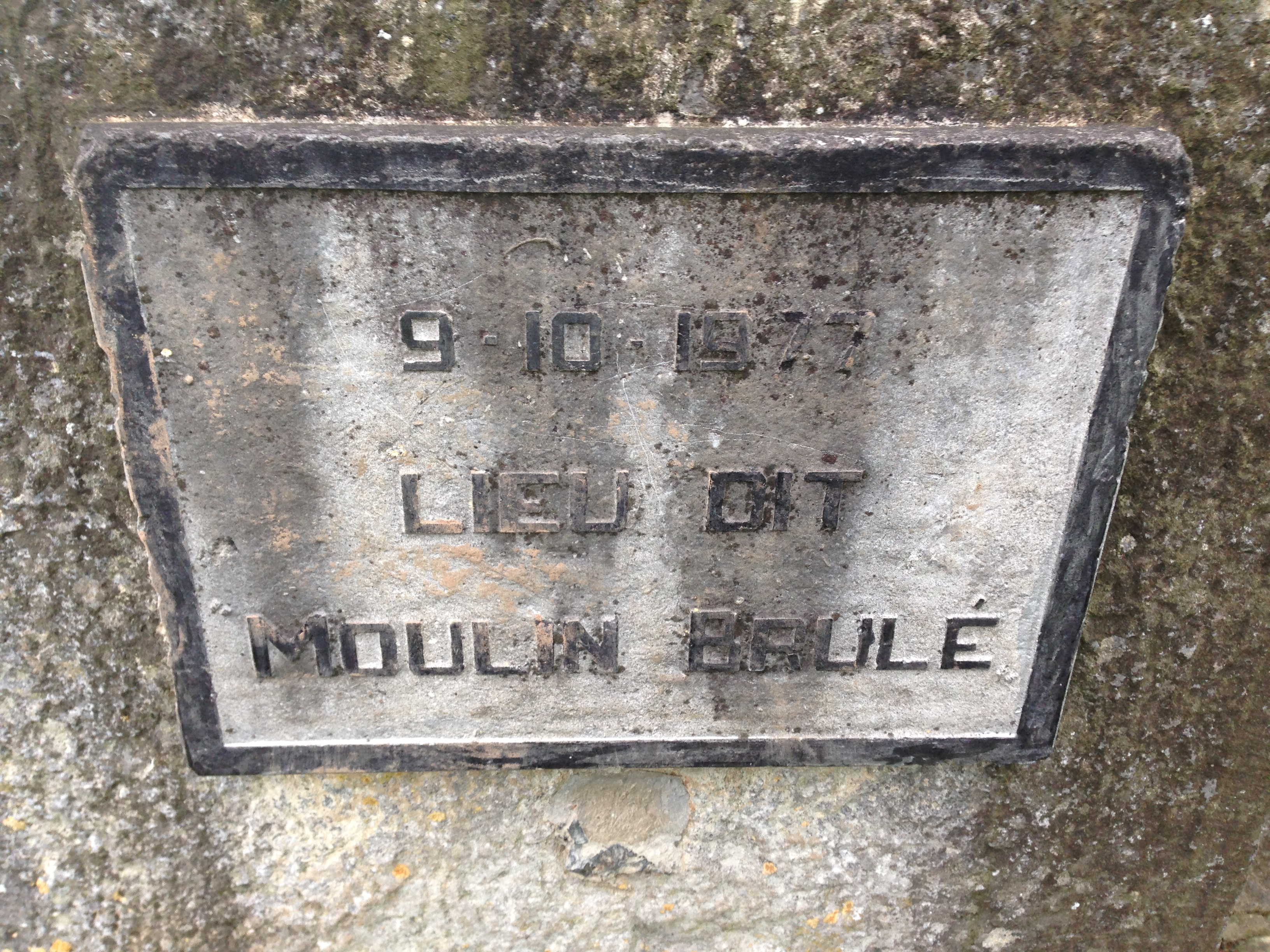 Zoom sur le panneau situé sur la façade du moulin brûlé de Quiévrain